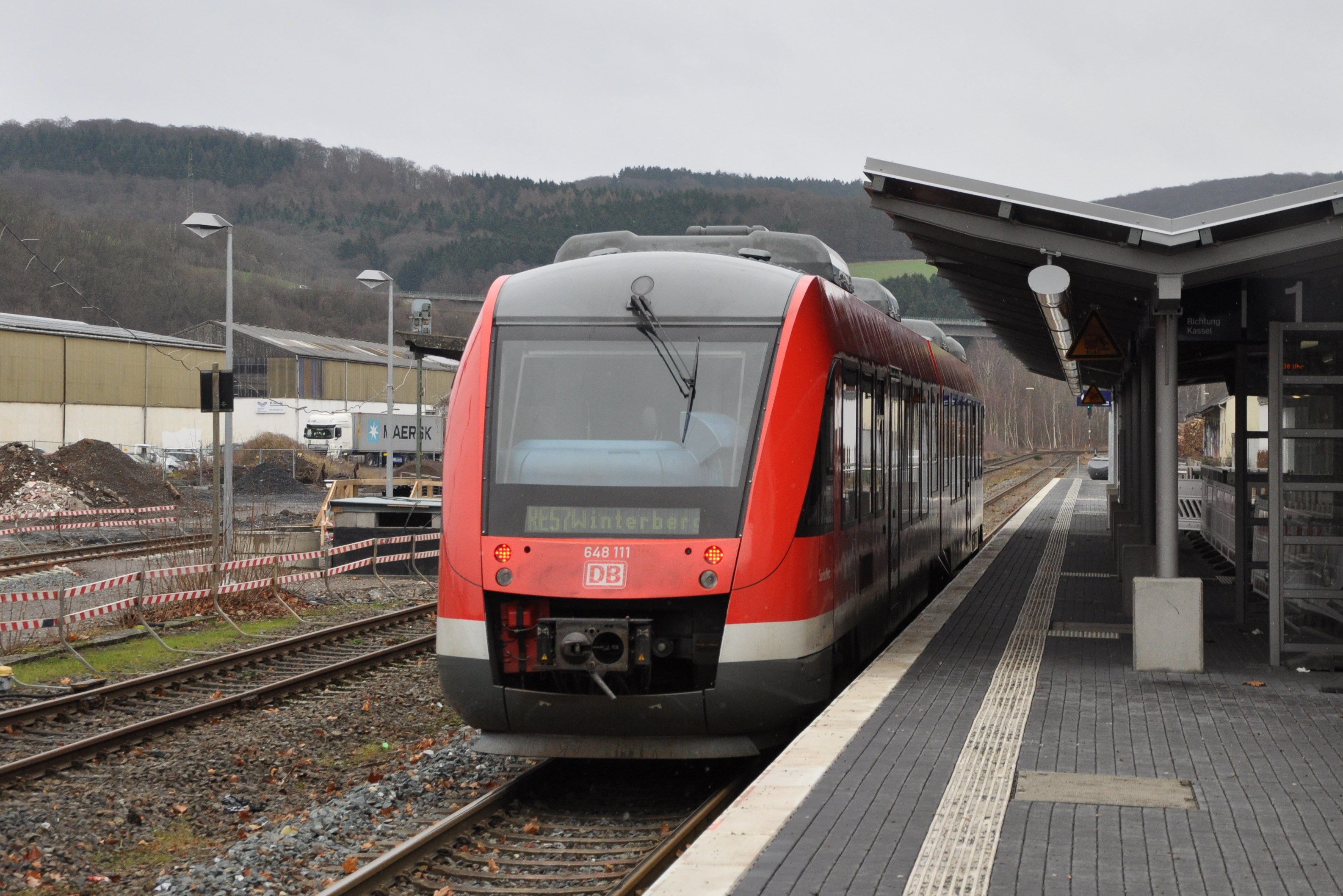 Hausbahnsteig des Arnsberger Bahnhofs mit LINT nach Winterberg.